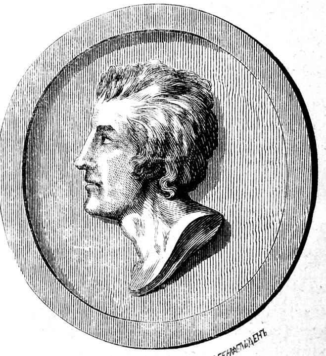 Пётр Лукич Вельяминов, литератор, переводчик, меценат